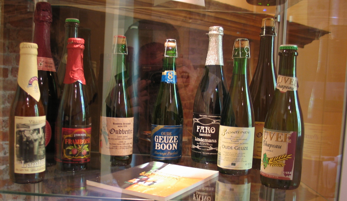 Bieren uit de streek rond Brussel - eigen foto